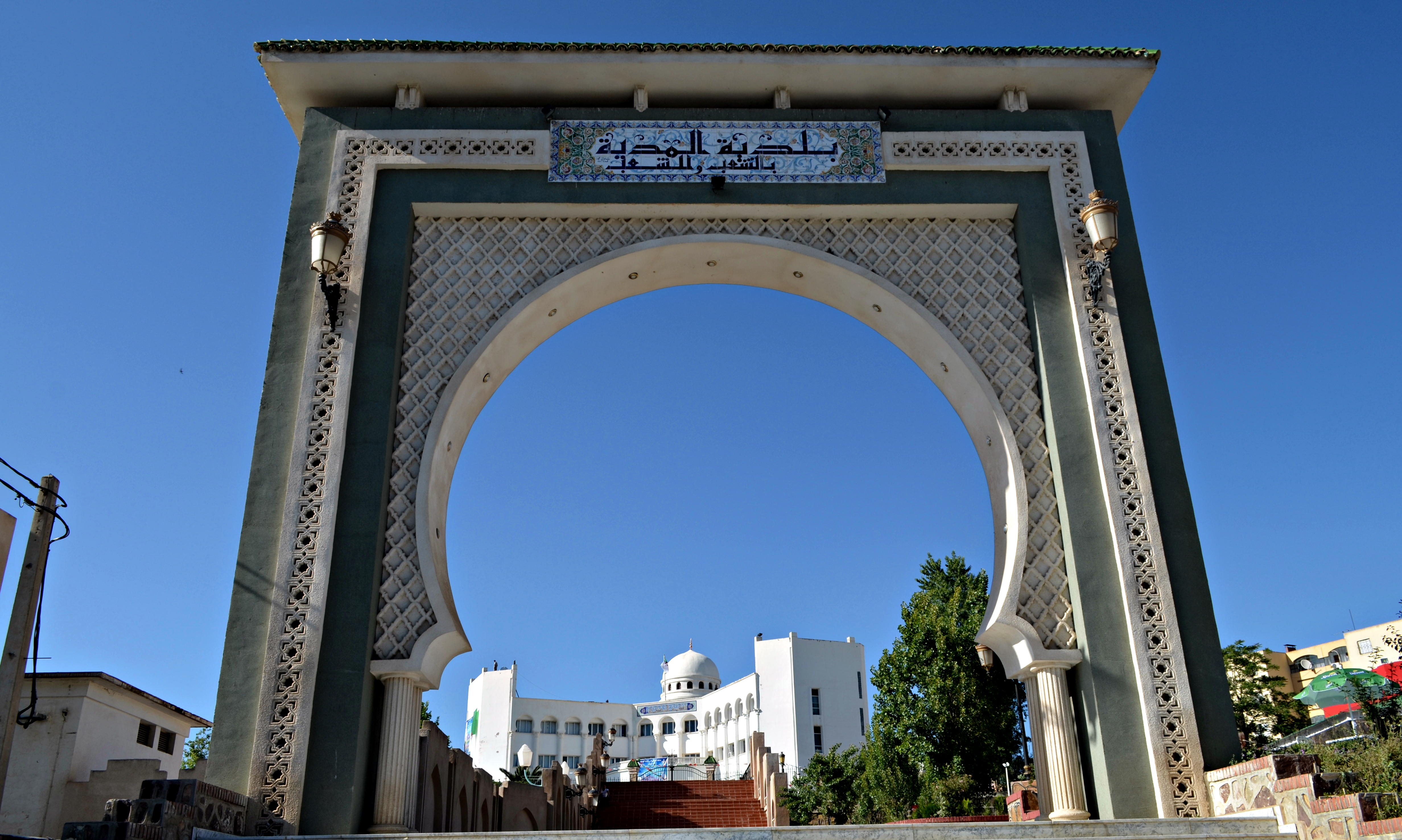 بوابة ومبنى بلدية المدية، المدية، الجزائر